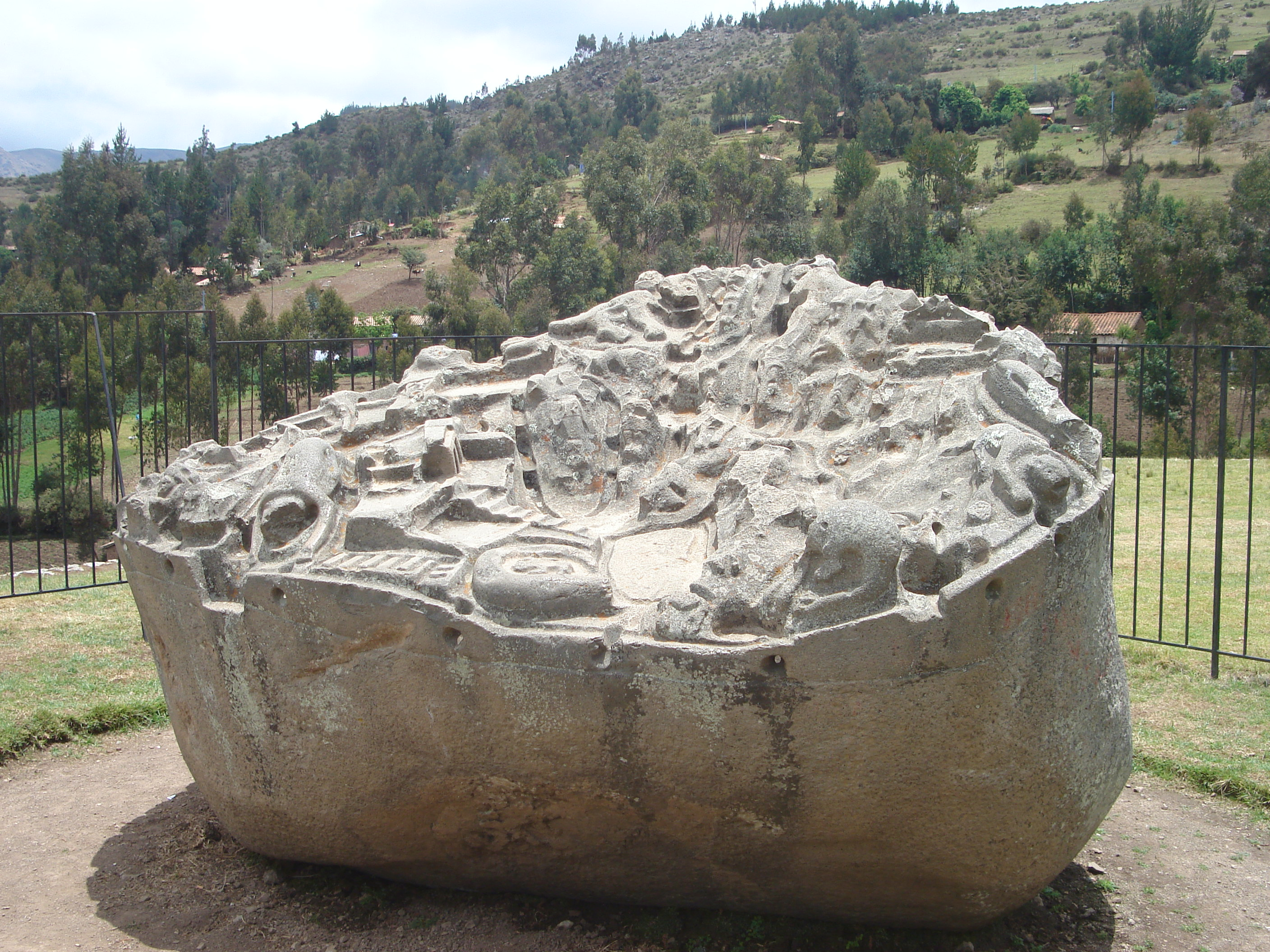 Piedra de Saywite, cerca a la carretera Abancay-Cusco, en el departamento de Apurímac, Perú.